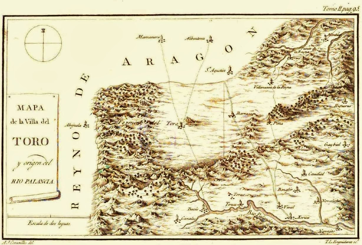 Mapa de El Toro en las Observaciones sobre la Historia Natural, Geografía, Agricultura, población y frutos del reyno de Valencia. / Por don Antonio Josef Cavanilles, Madrid, 1795-1797